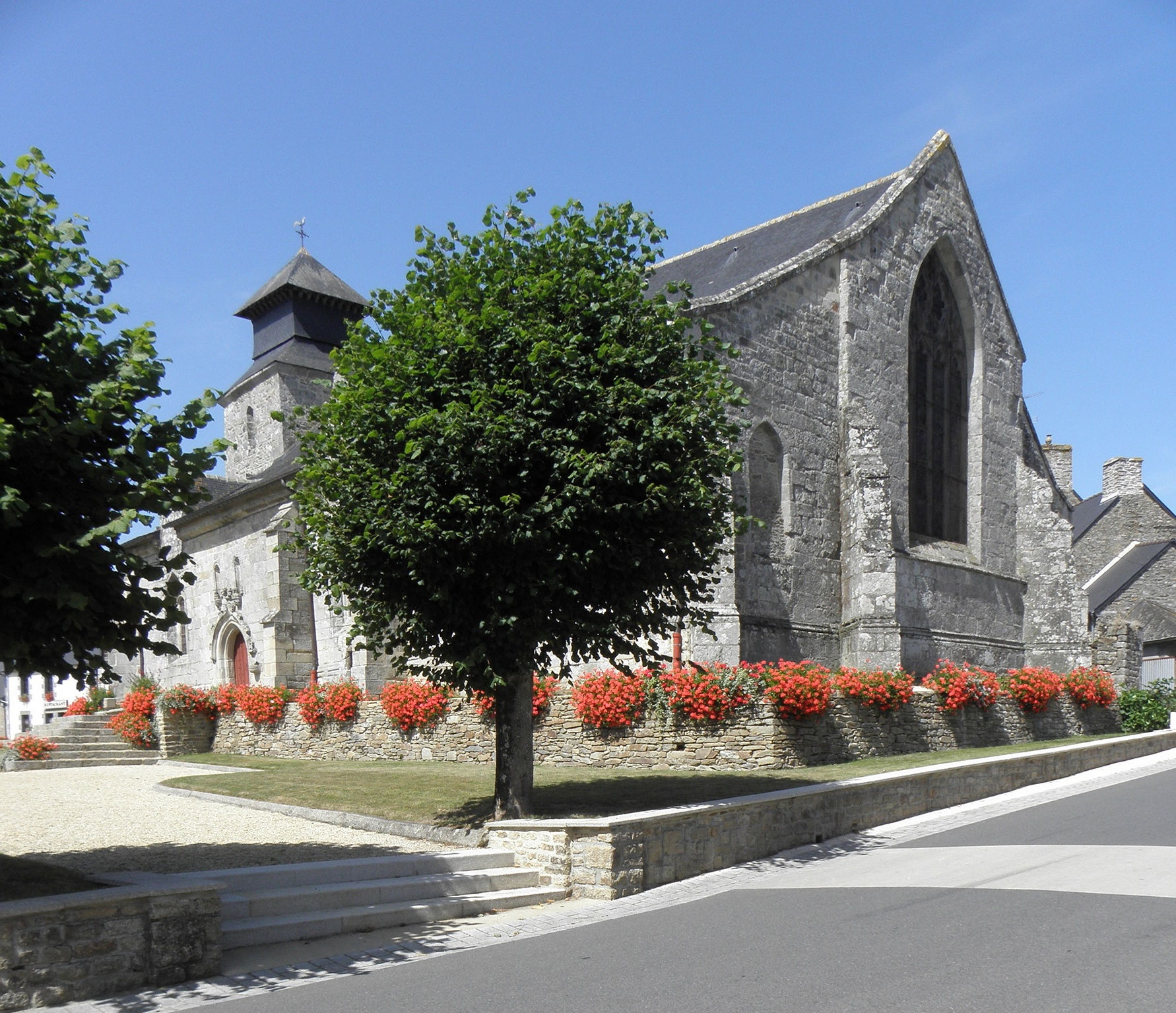 Église Saint-Gal de Langast (22). Chevet et flanc sud.